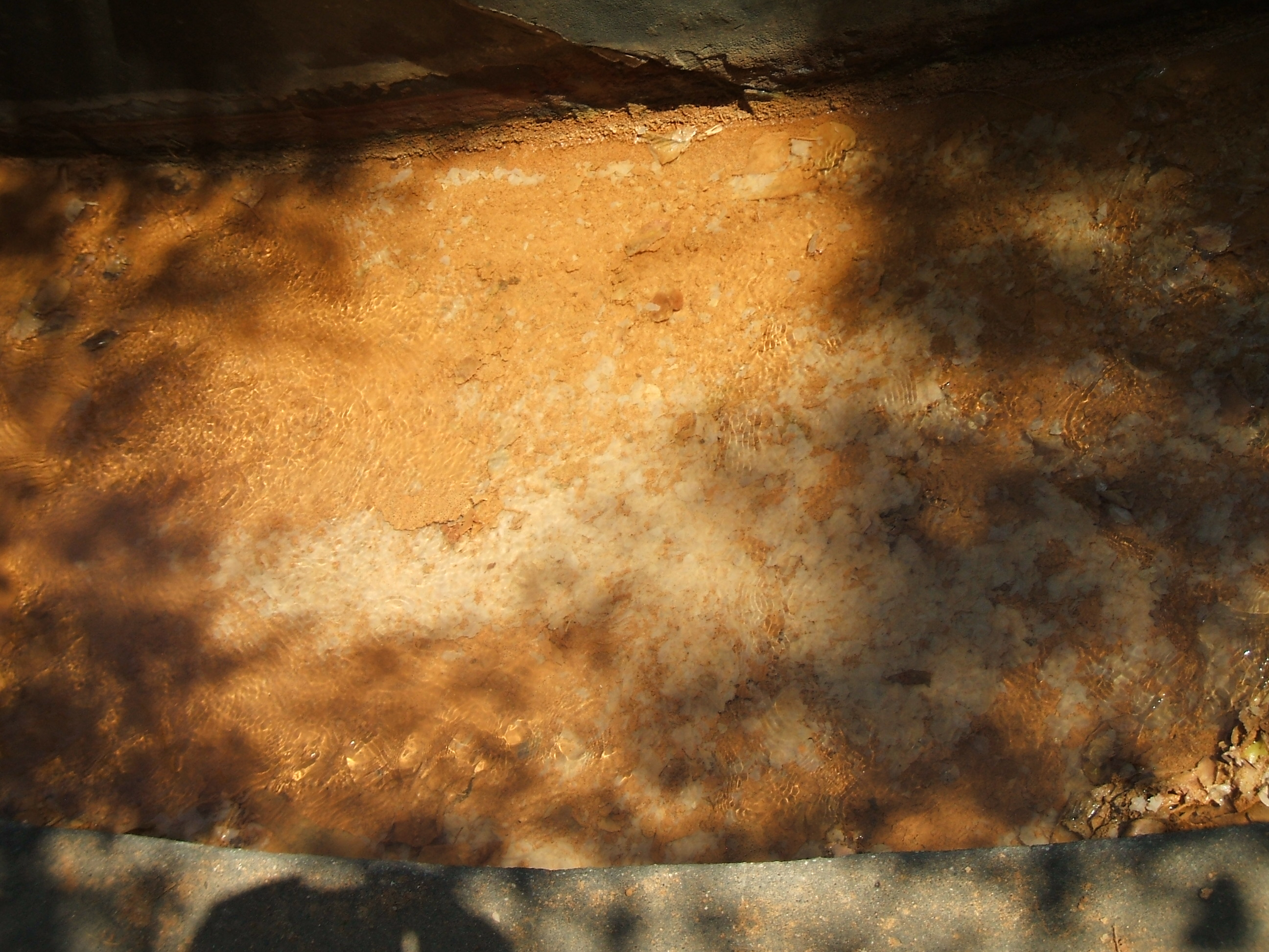 Durch Veränderungen der chemischen und physikalischen Umstände fallen aus der Sole weiße, schuppenartige mineralische Flocken aus, die schwerer als die angereicherte Sole sind und sich am Boden ablagern; es kann vermutet werden, dass salz- und säuretolerantes pflanzliches Leben (eher ockerfarbene Algenteppiche mit in ihnen gefangenen Gasblasen) die Bildung fördern könnten